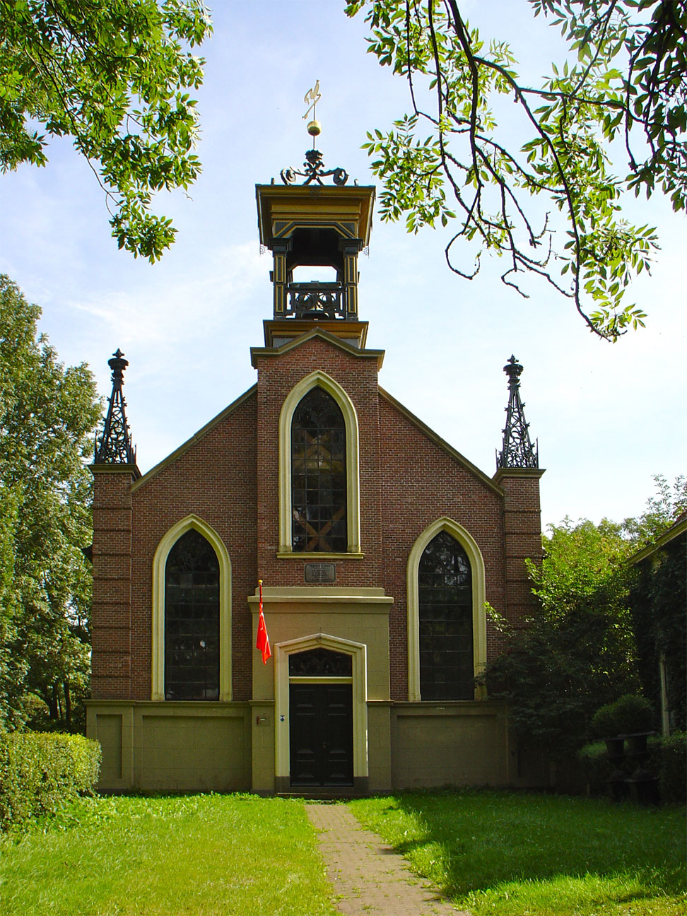 Kerk van Wittewierum in de gemeente Ten Boer